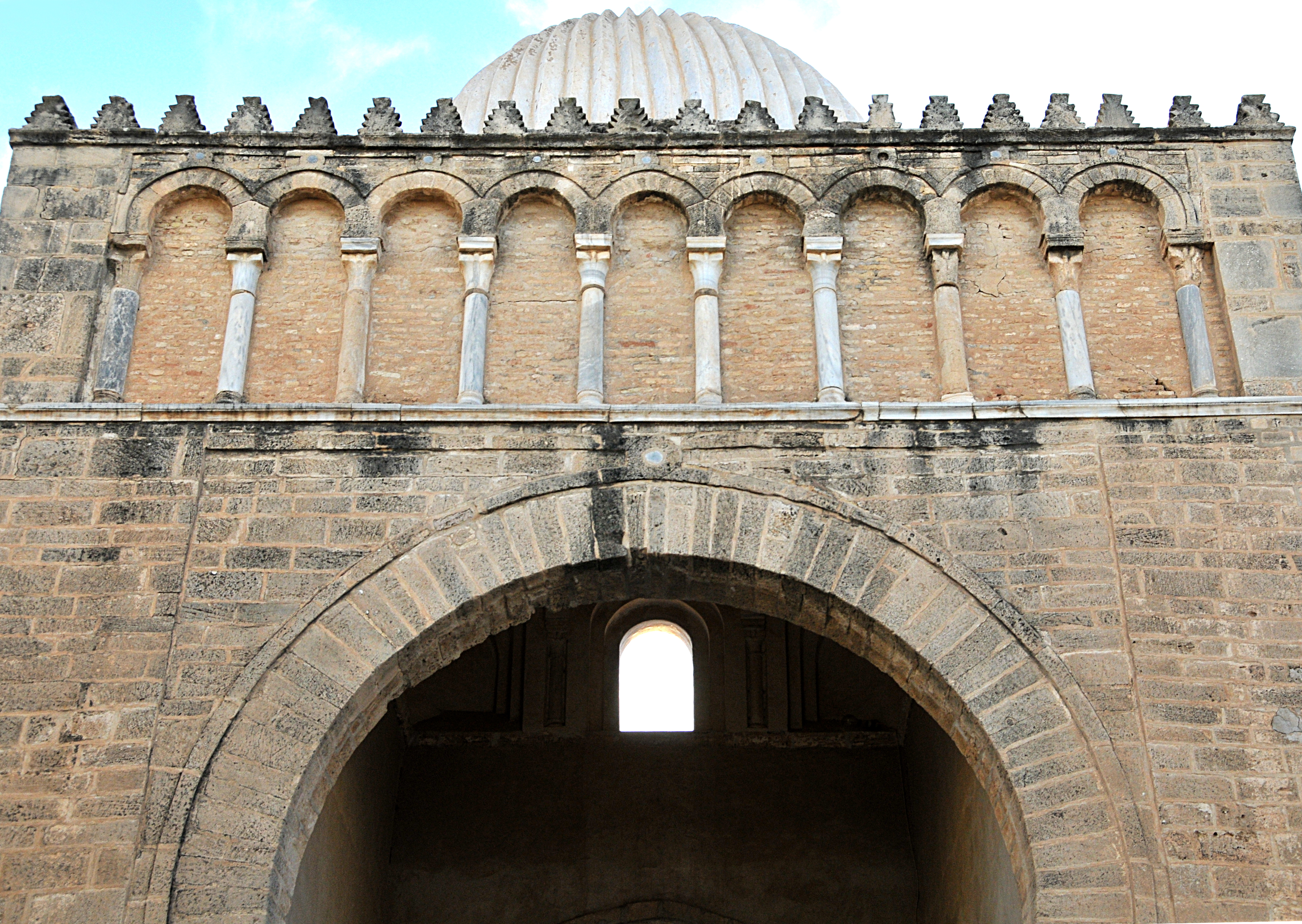 Vue de l'arcature aveugle ornant la partie supérieure du porche de Baba Lalla Rihana à la Grande Mosquée de Kairouan, en Tunisie.